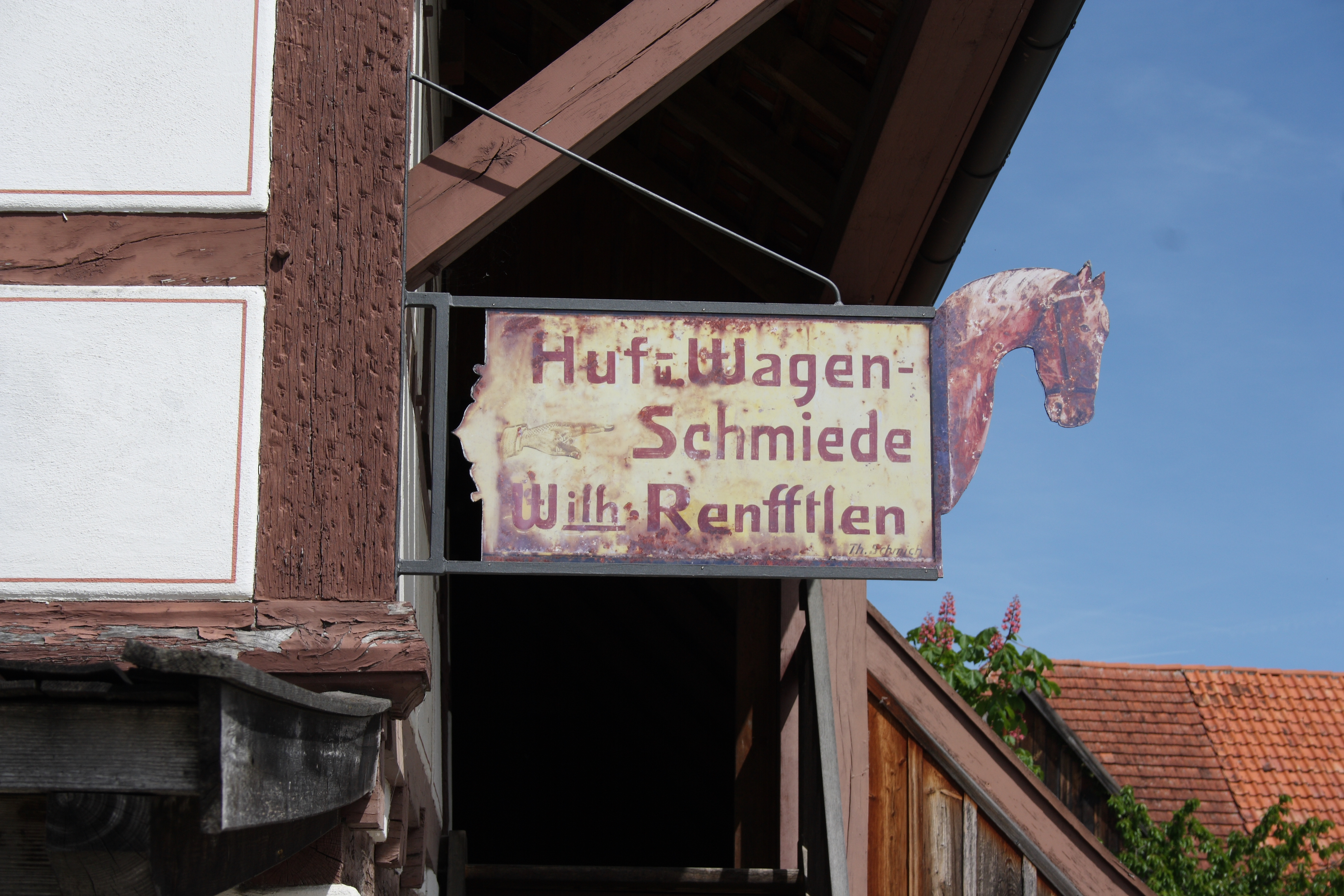 Ehemalige Schmiede in Haunsheim, einer Gemeinde im Landkreis Dillingen an der Donau (Bayern), Huf- und Wagenschmiede, Schild